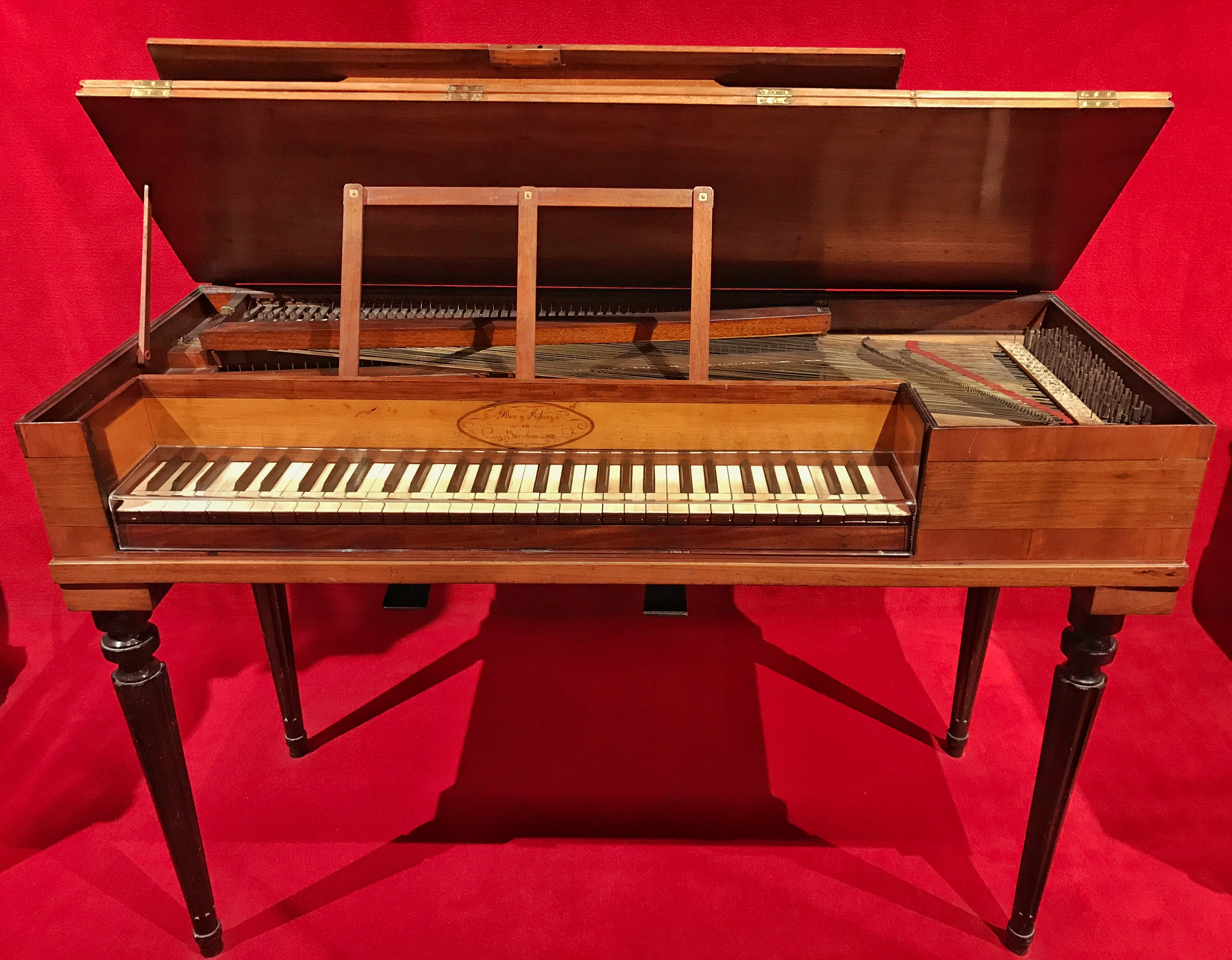 Piano de taula construït per Johannes Kyburz i Joseph Franz Otter el 1800, al fons del Museu de la Música de Barcelona